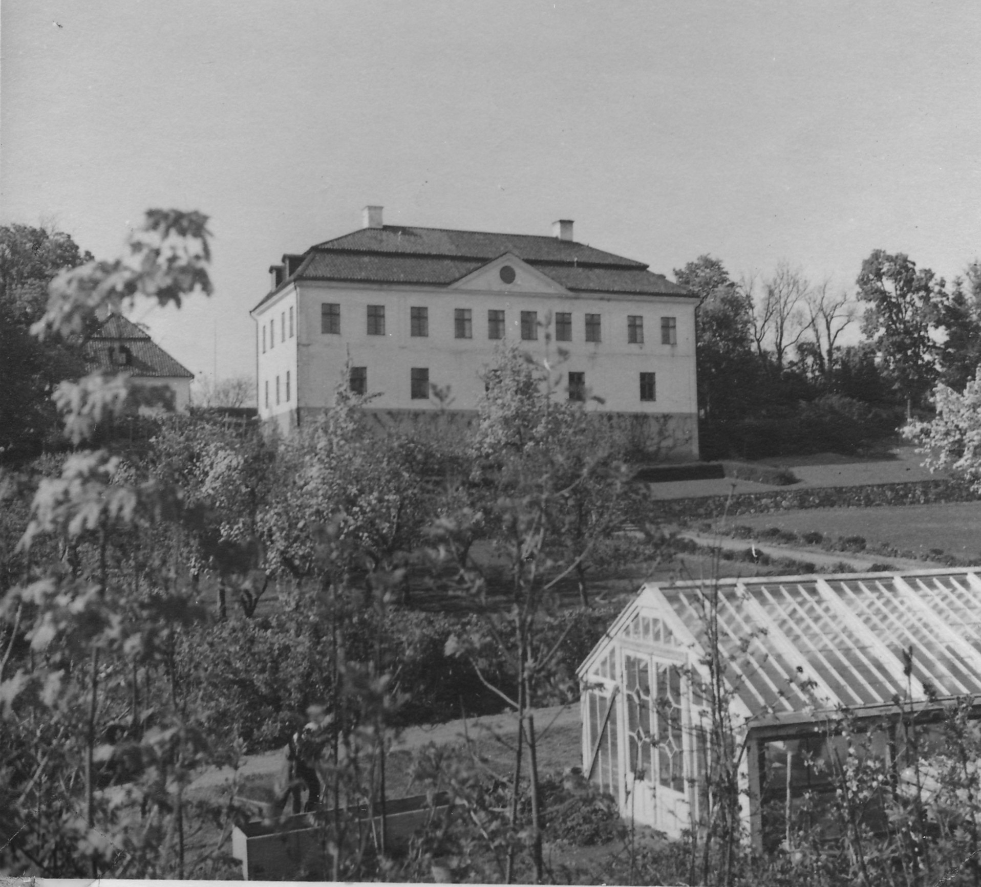 Bild av slottet